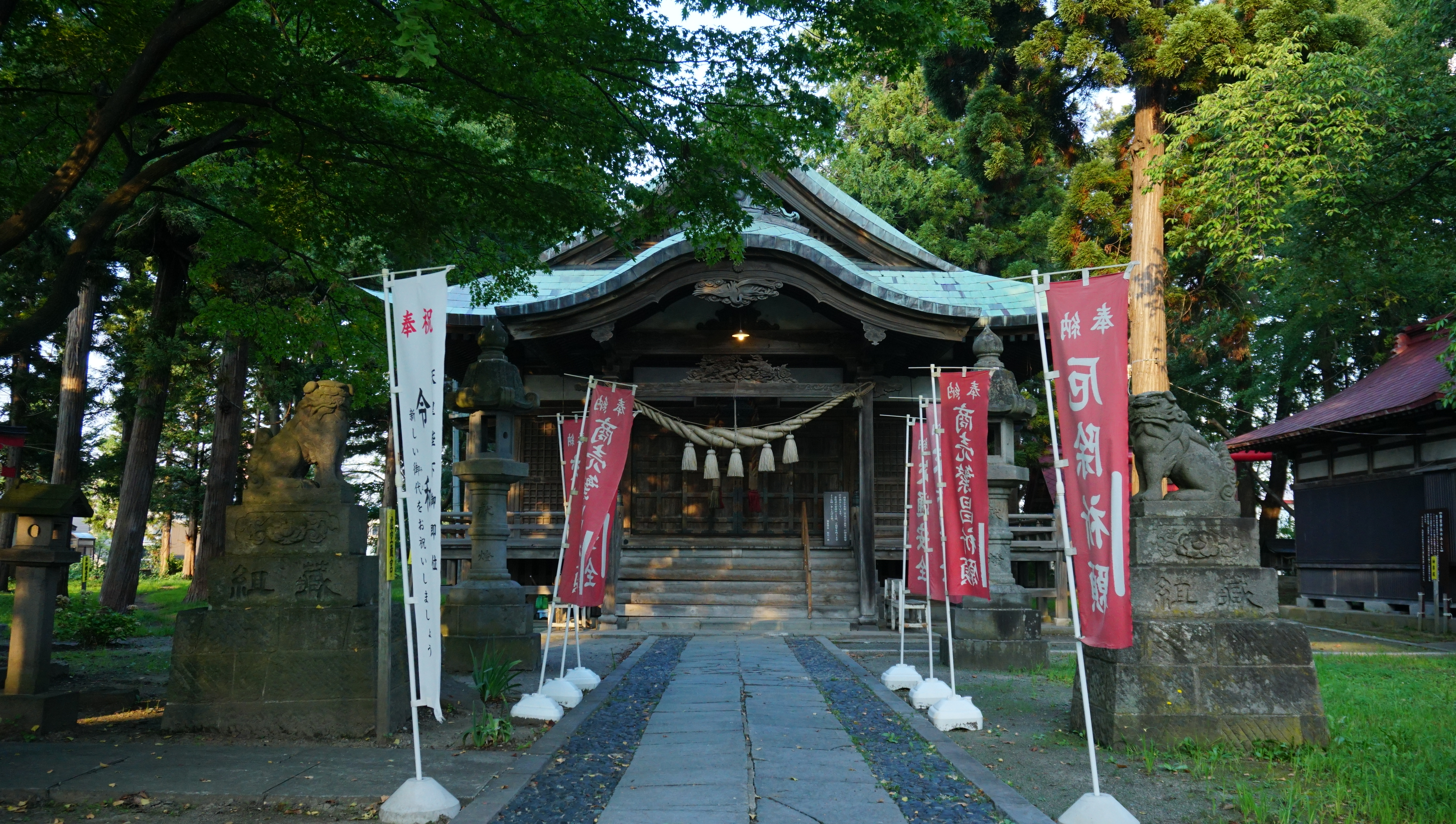 海童神社（青森県北津軽郡板柳町） 津軽為信の創建と伝わる。